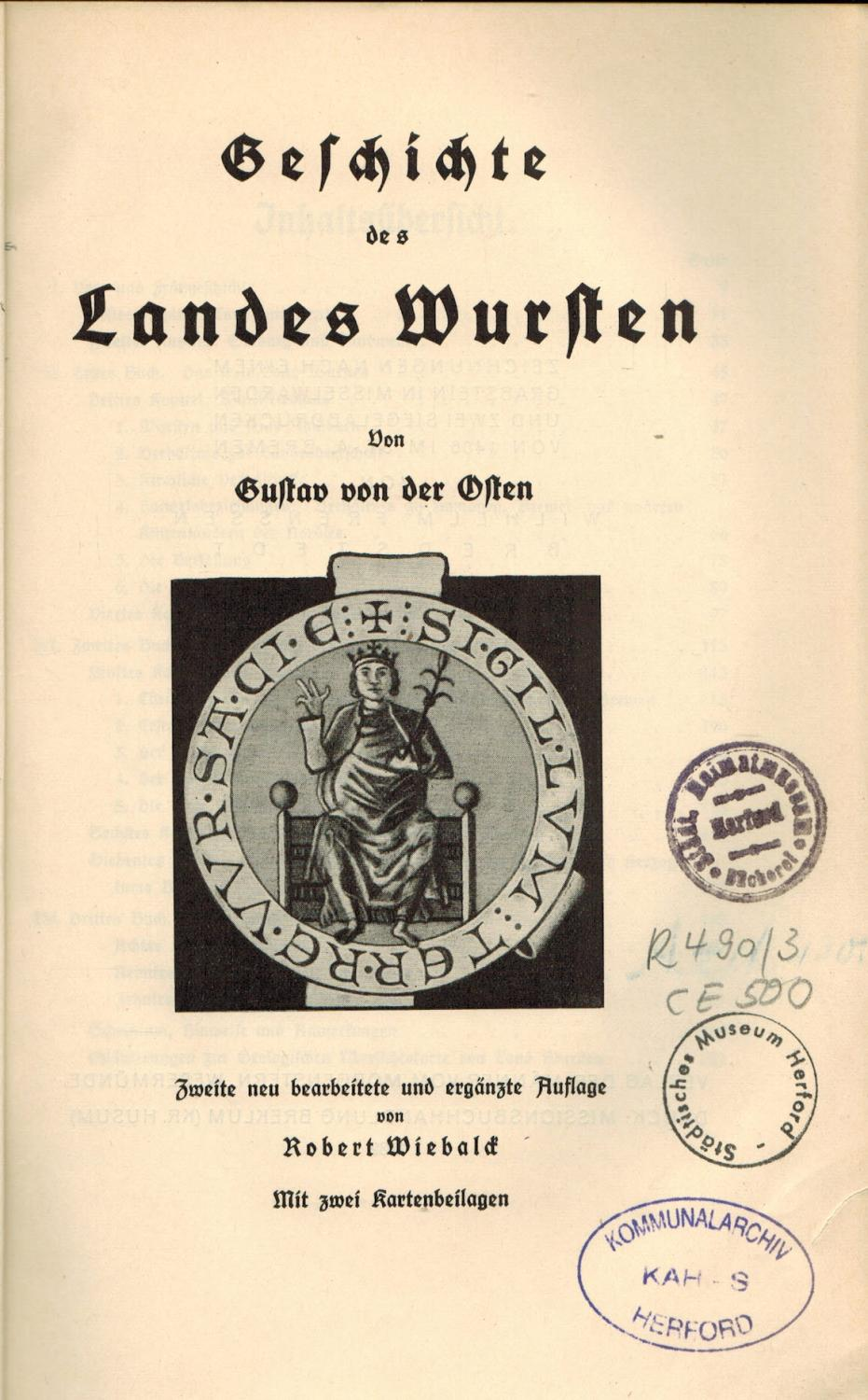 Titelblatt des zuvor in zwei Bänden von 1900 bis 1902 erschienenen wissenschaftlichen Hauptwerkes des Historikers und Heimatforschers Gustav von der Osten zur „Geschichte des Landes Wursten“ in zweiter, neu bearbeiteter und ergänzter Auflage 1932 herausgegeben von Robert Wiebalck. Das Blatt trägt die Besitzstempel „Städt. Heimatmuseum Herford“ und „Städtisches Museum Herford“ sowie vom „Kommunalarchiv Herford“.